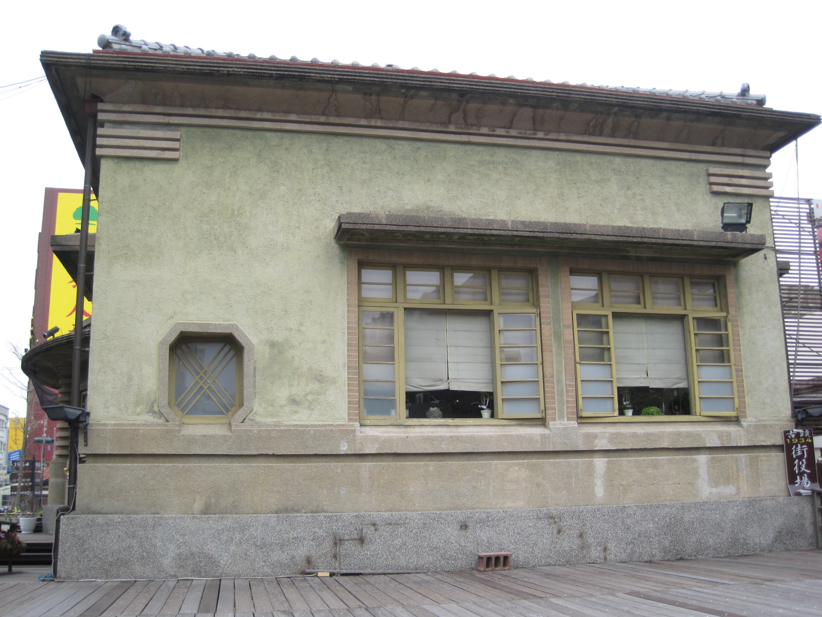 新化街役場側面